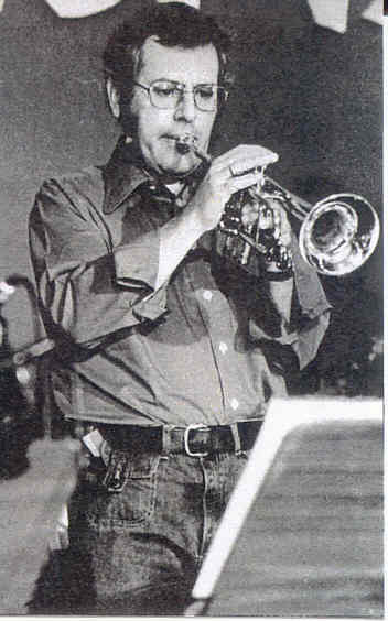 Friedel Keim mit Conn-C-Trompete